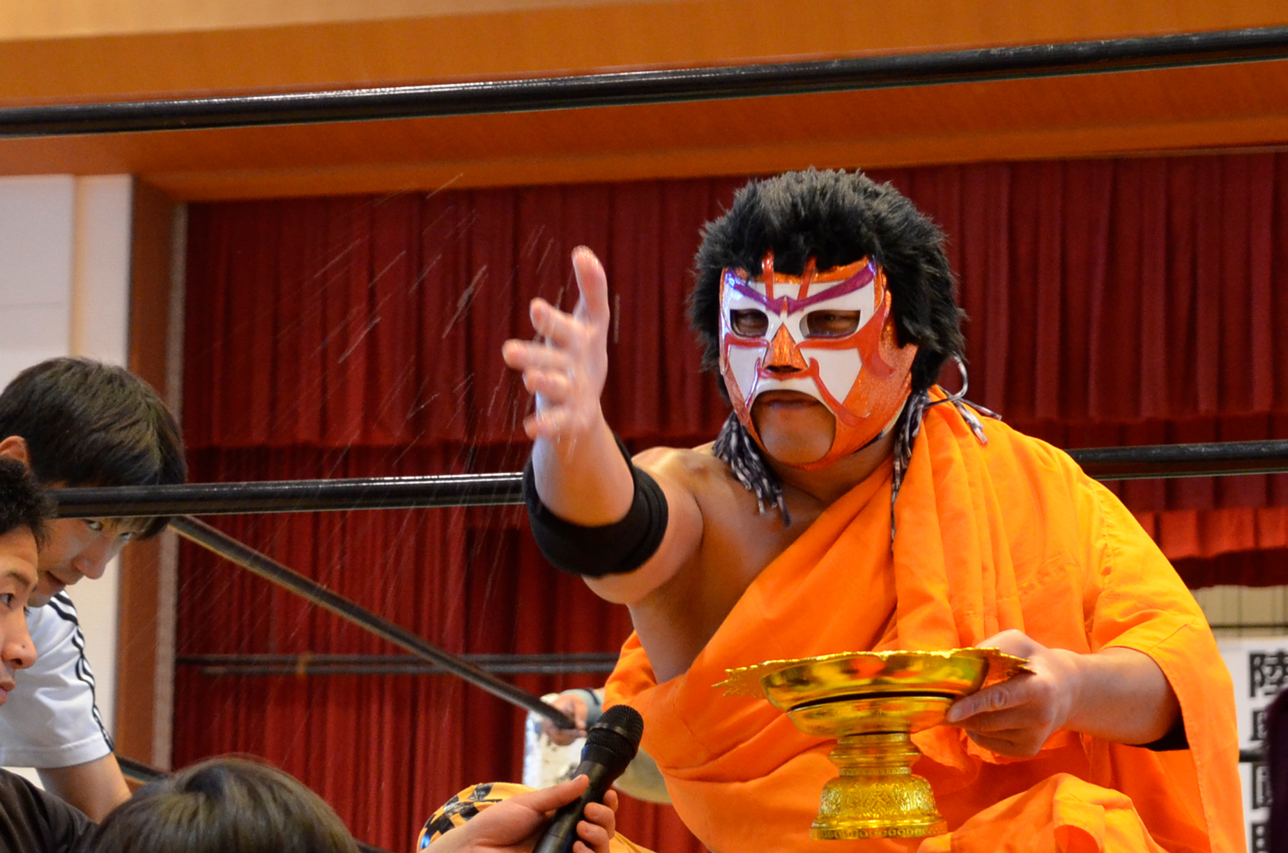 ザ・グレート・サスケ